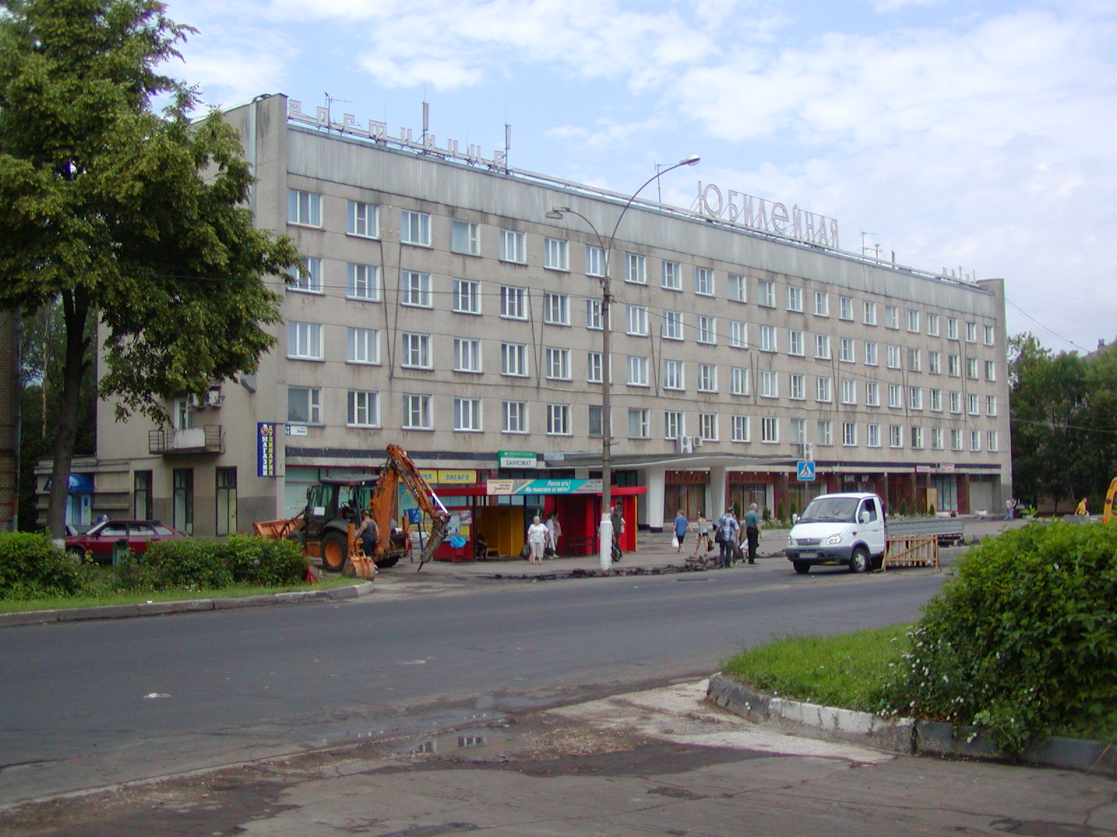 Гостиница "Юбилейная" в городе Обнинске.